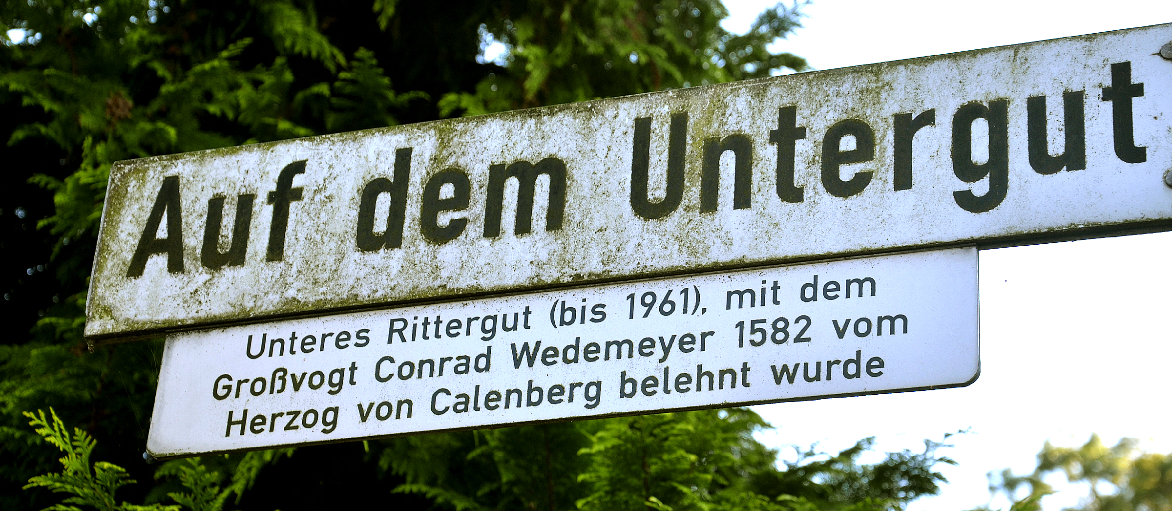 Das Straßenschild Auf dem Untergut in Eldagsen in der Region Hannover mit einer gesondert angebrachten Legendentafel: „Unteres Rittergut (bis 1961), mit dem Großvogt Conrad Wedemyer 1582 vom Herzog von Calenberg belehnt wurde“ ...